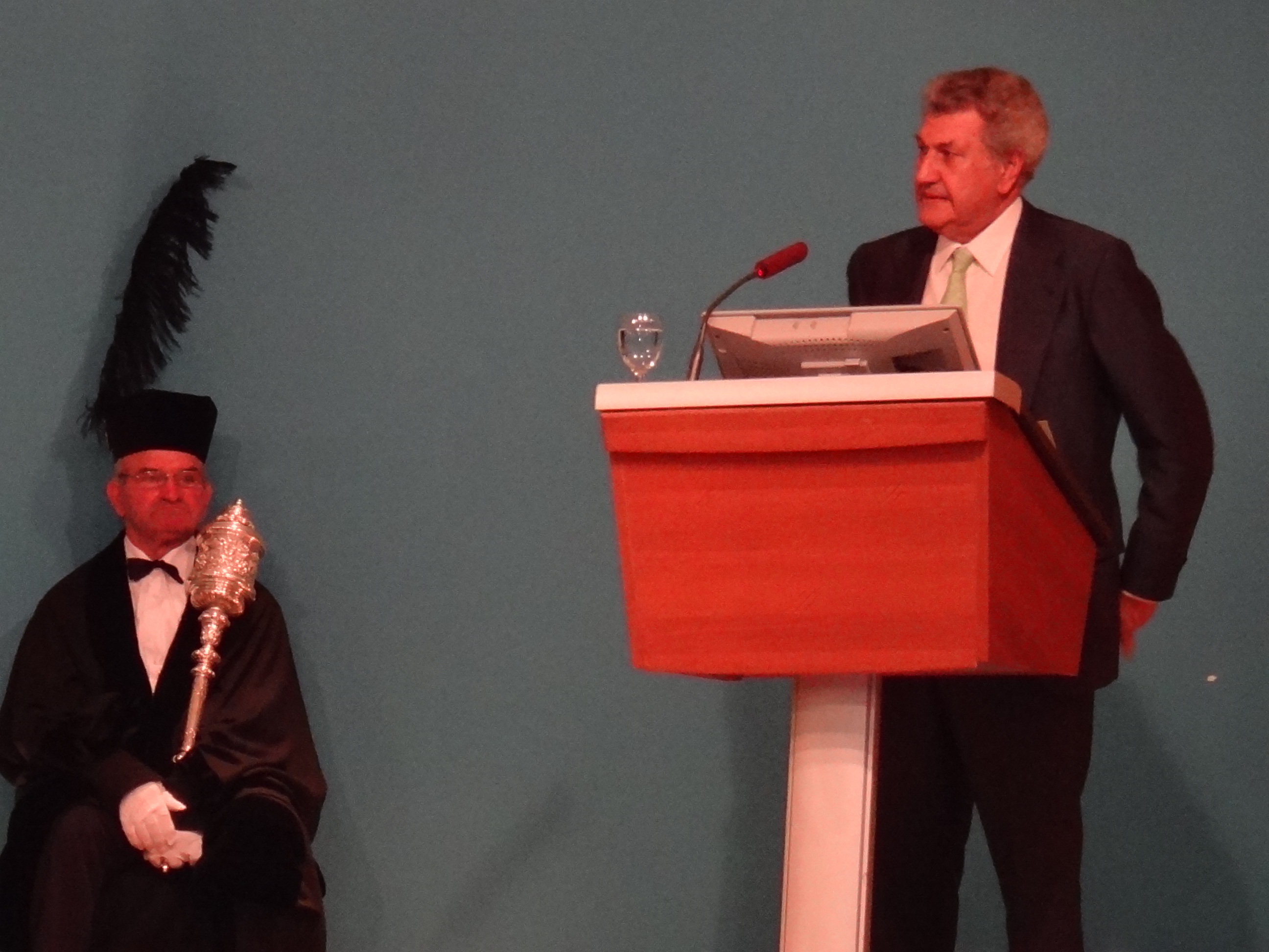 Jesús Posada en el Claustro Extraordinario de la Universidad de Cádiz, actos de Investidura de nuevos Doctores